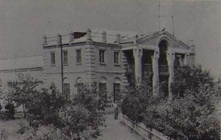 Палац культури "Дружба", с. Бородаївка, 1965 р.